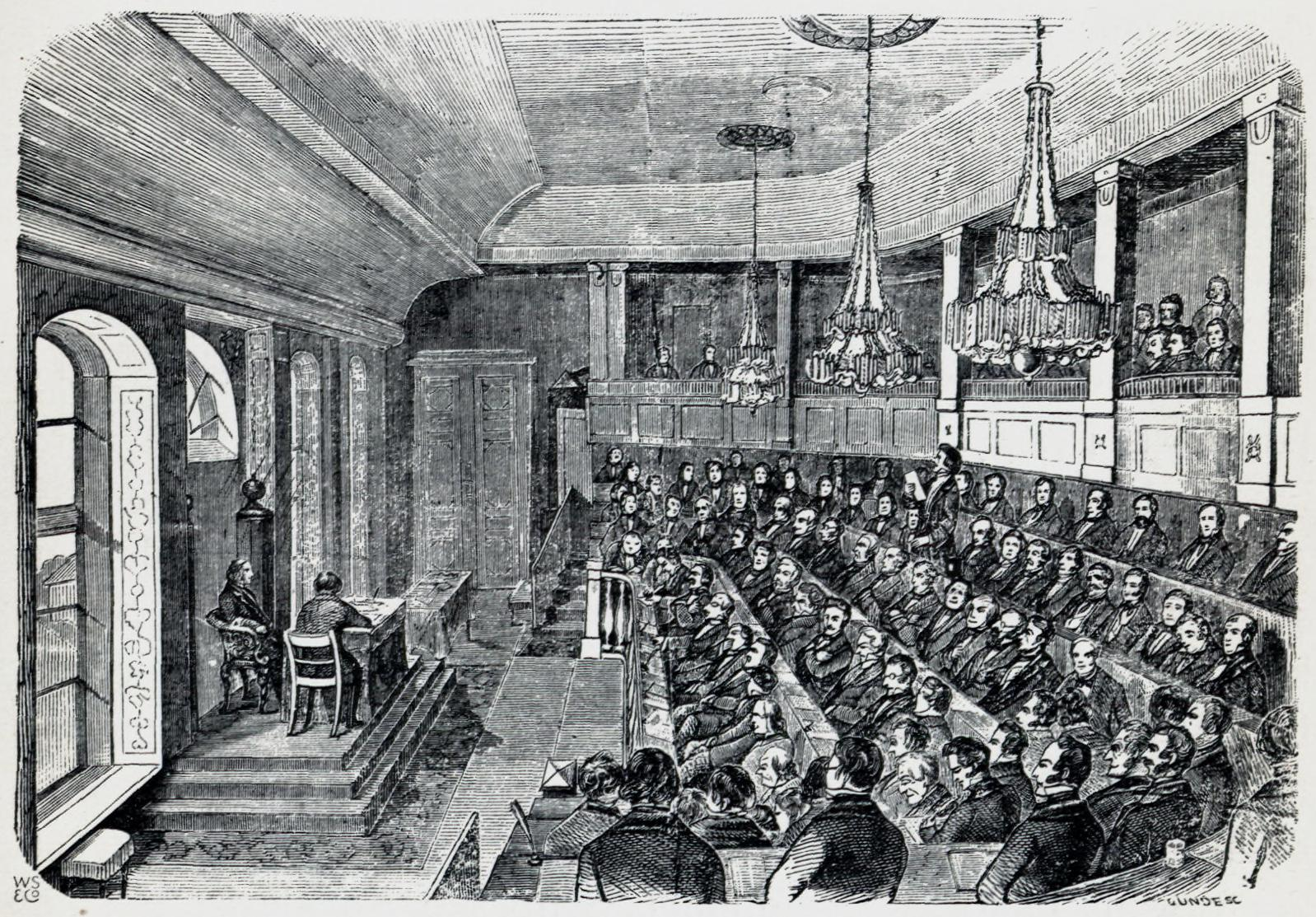 Illustrasjon hentet fra boken "En Christianiensers Erindringer fra 1850- og 60-Aarene" av Nielsen, Yngvar og utgitt av Gyldendal (Kristiania, 1910). Den gamle Storthingssal. Det forsamlede femtende ordentlige Storthing 1857.